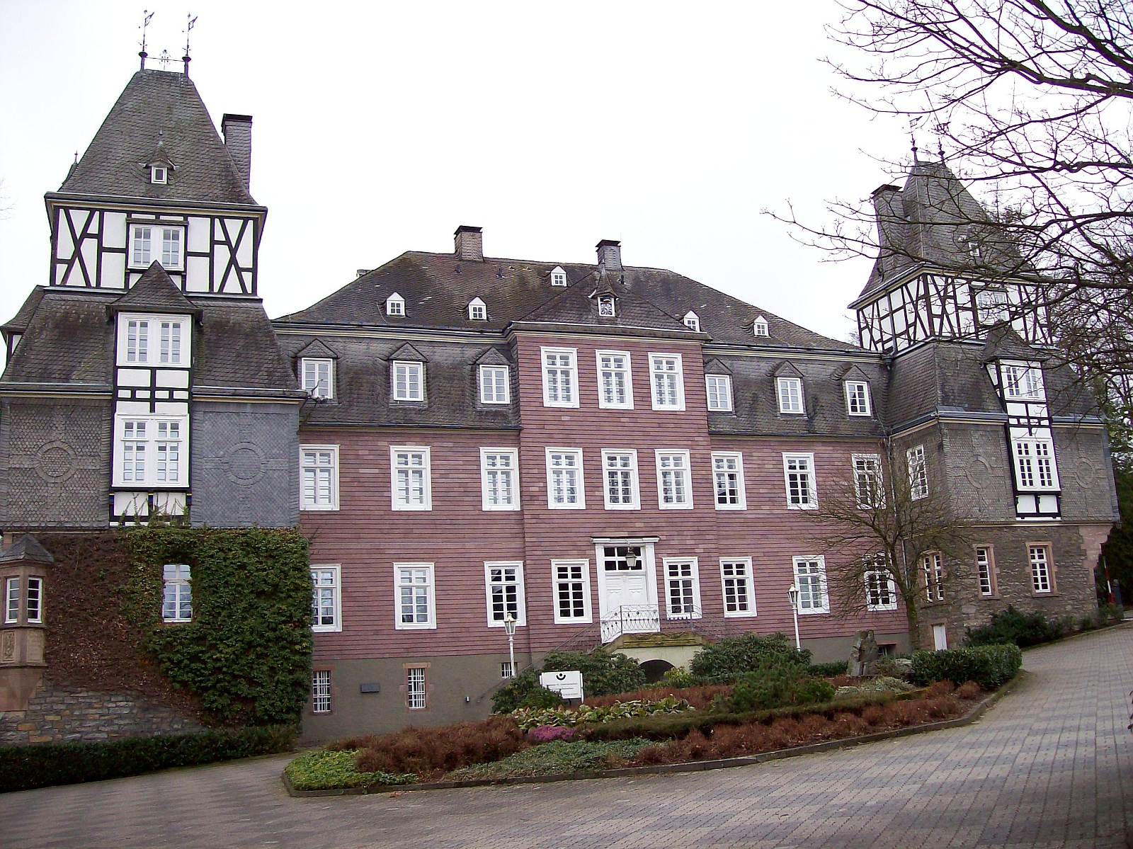 Schloss Gevelinghausen in Olsberg (Germany)